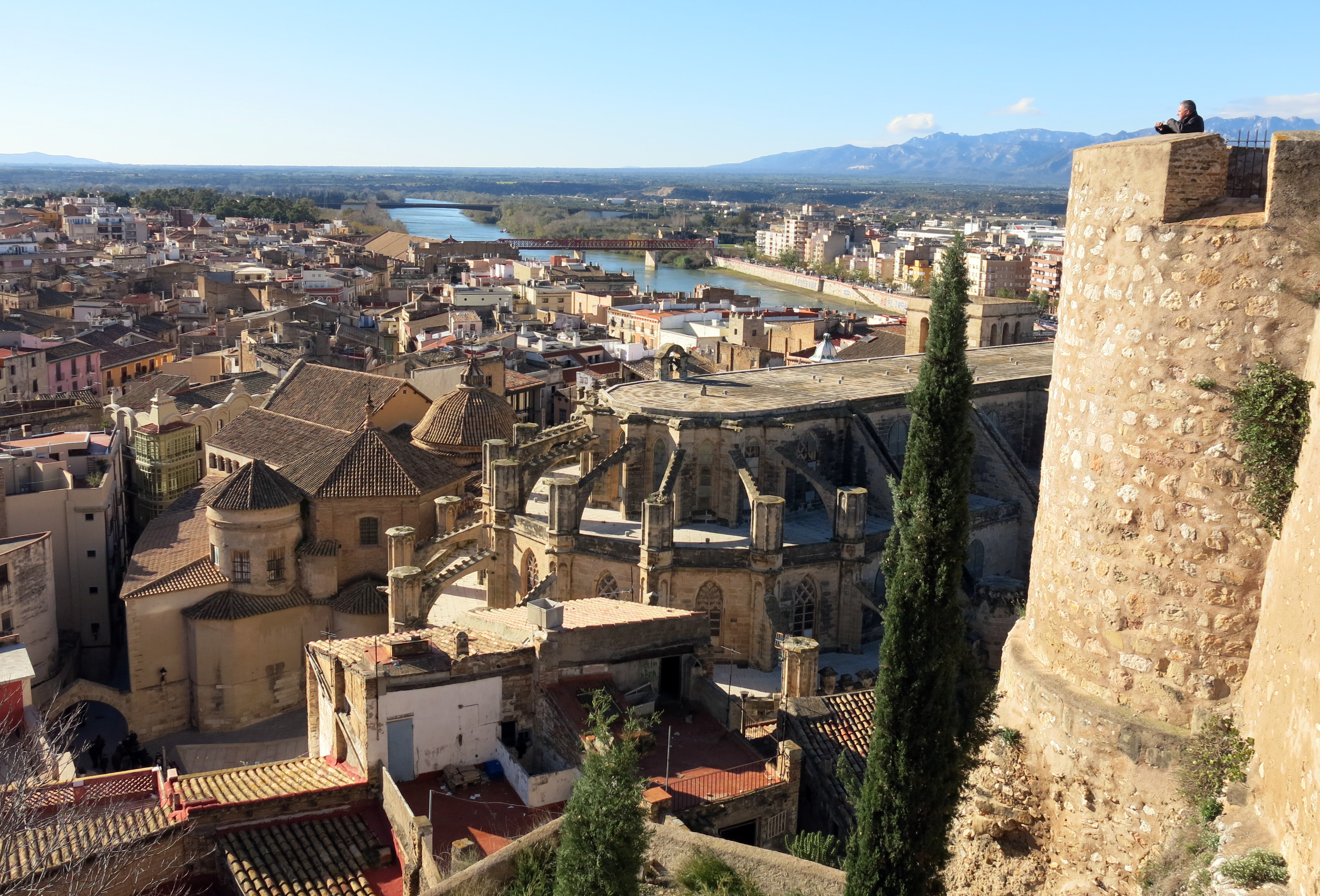 Catedral de Santa Maria (Tortosa)